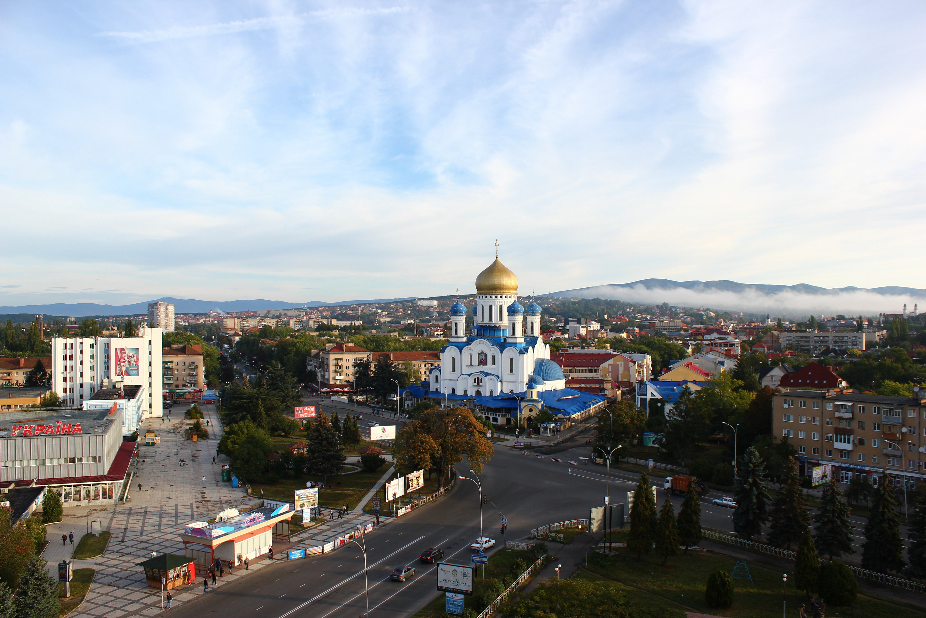 Blick vom Hotel Intourist "Zakarpatija" über Uschhorod. Im Vordergrund die russisch-orthodoxe Kirche.